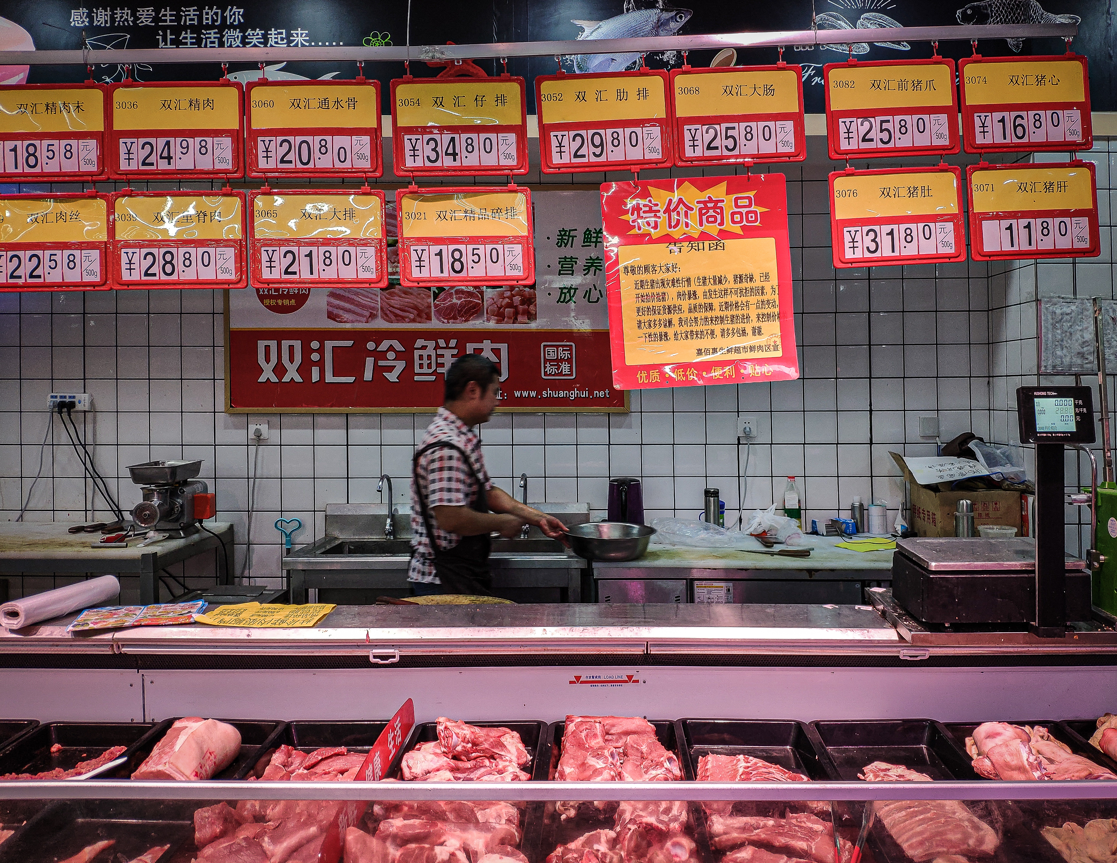 中文（中国大陆）: 非洲猪瘟时期中国的一处肉类市场，猪肉价格走高，市场张贴相关说明